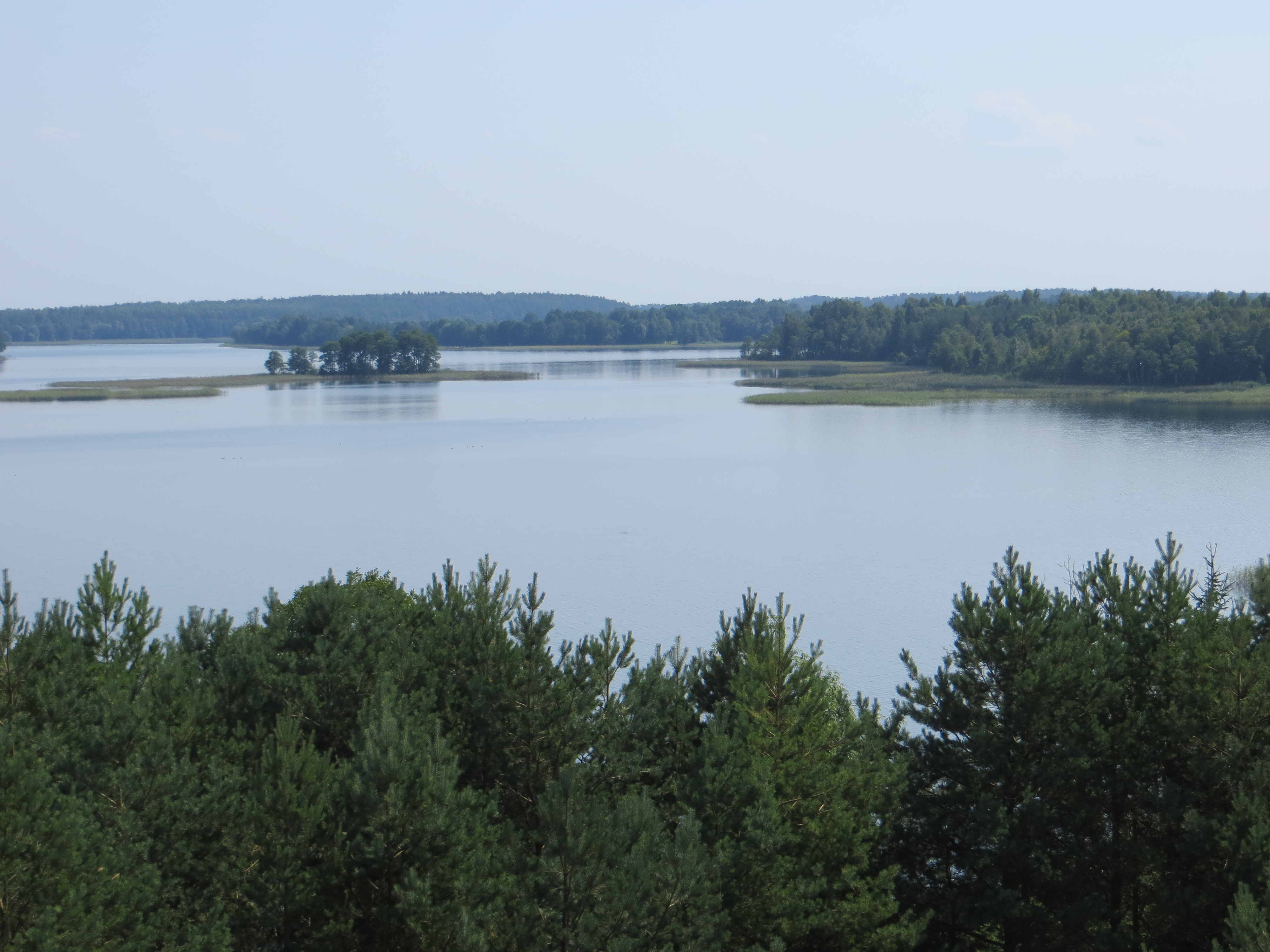 Veisiejų sen., Lithuania